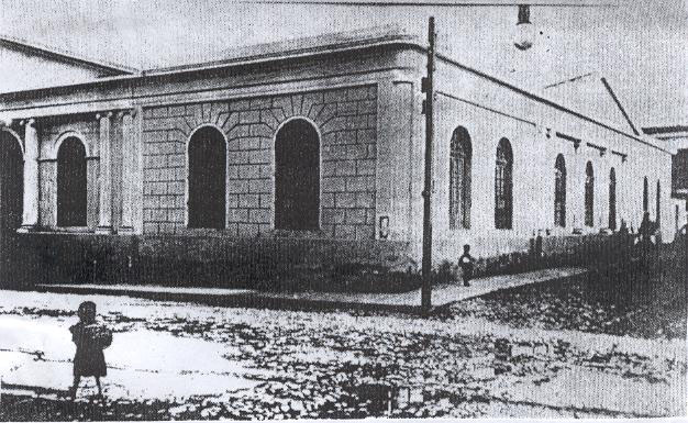 Fachada Escuela Normal de Catamarca